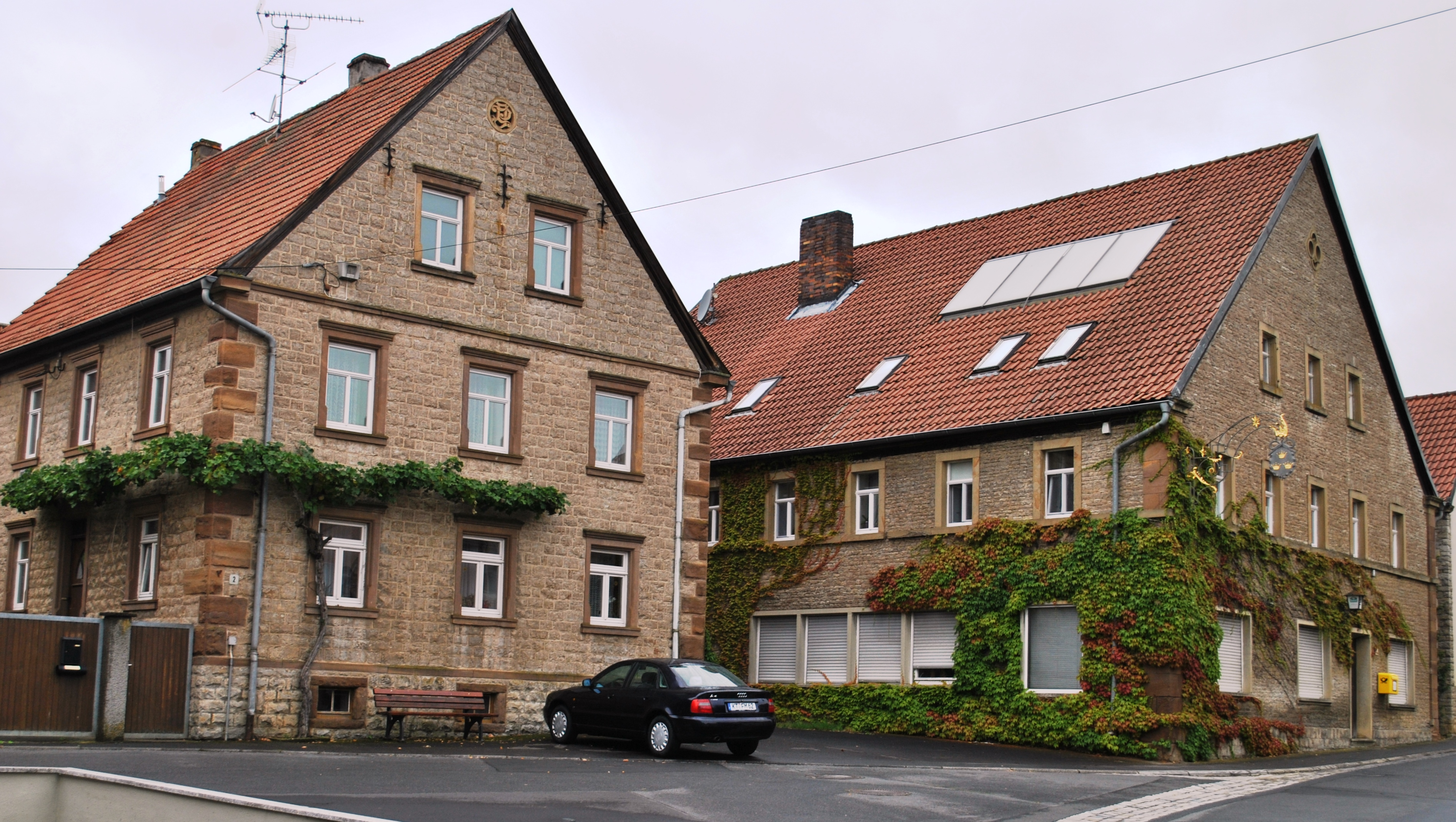 Häuser Seubeltstraße 1, Volkacher Straße 31 mit Wirtshausausleger